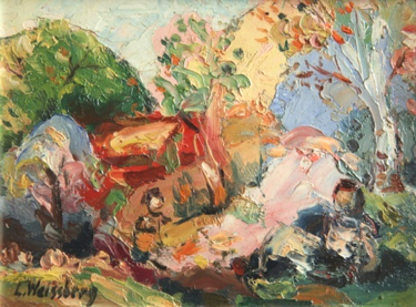 Tableau Entraygues, Les Arbres roses, de Léon Weissberg